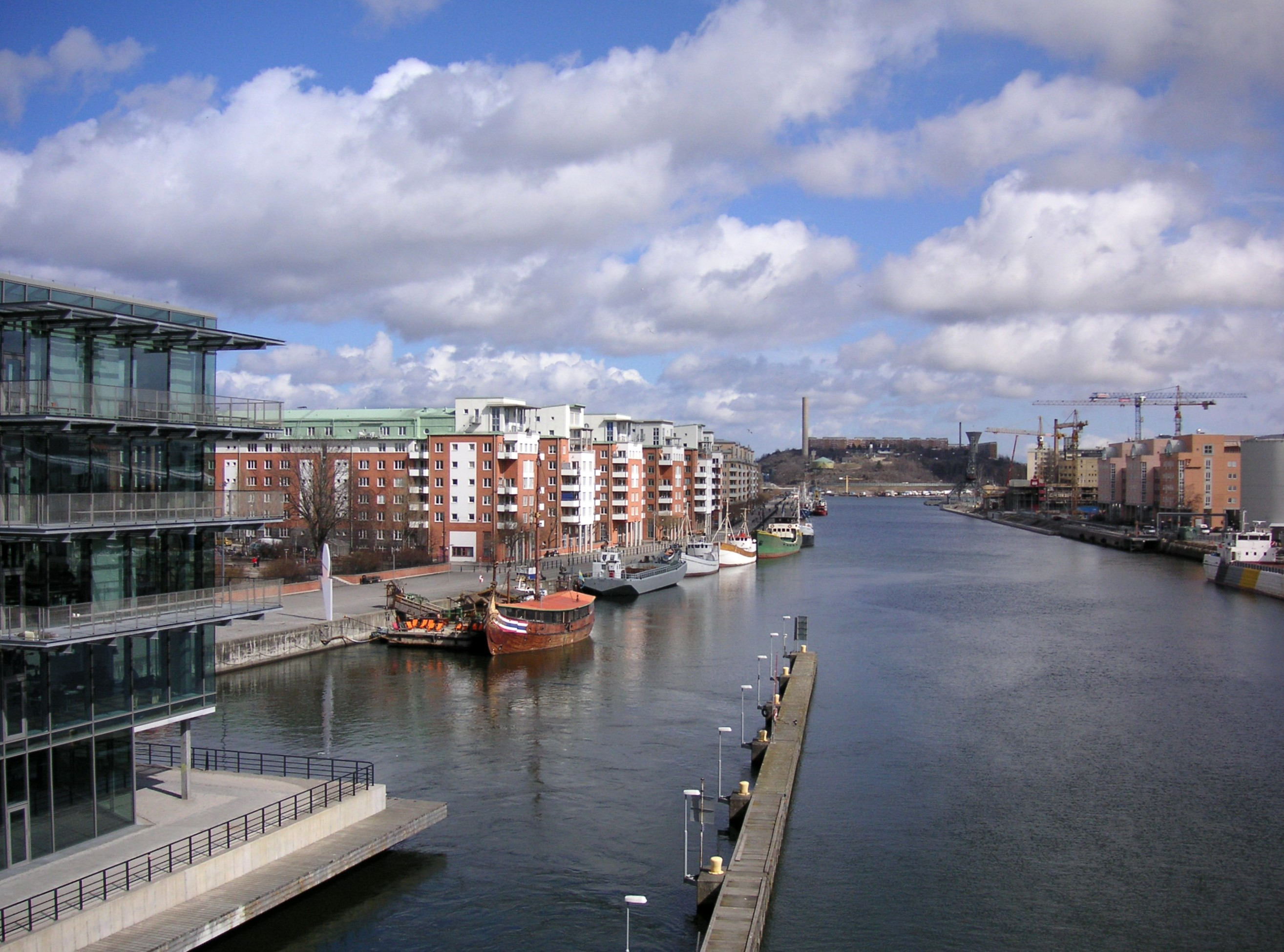 Hammarbyleden, Hammarbykanalen i Stockholm